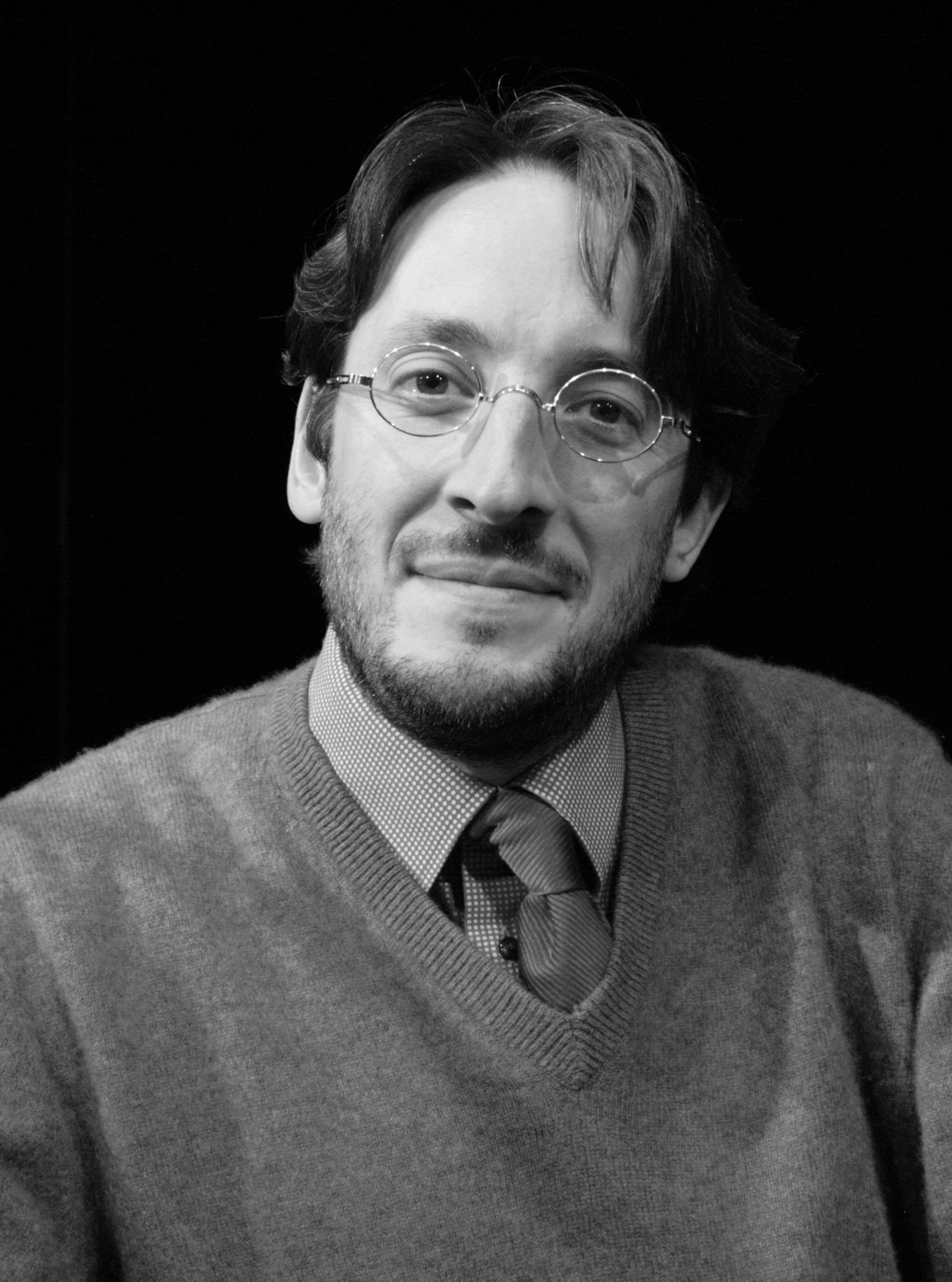 Nicolas d’Estienne d’Orves né le 10 septembre 1974 à Neuilly-sur-Seine est un écrivain et journaliste français.